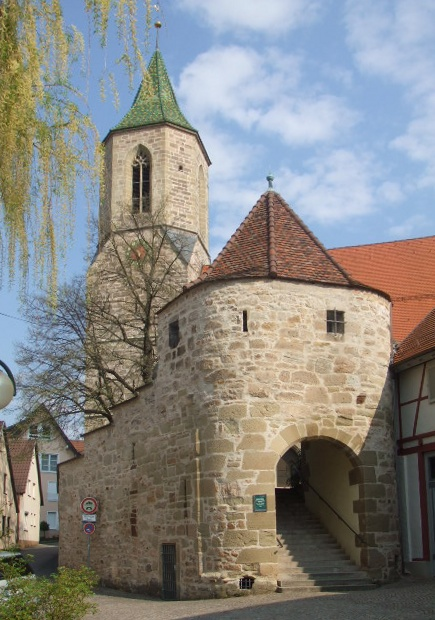 Beutelsbach, Weinstadt, Rems-Murr-Kreis Stiftskirche Beutelsbach